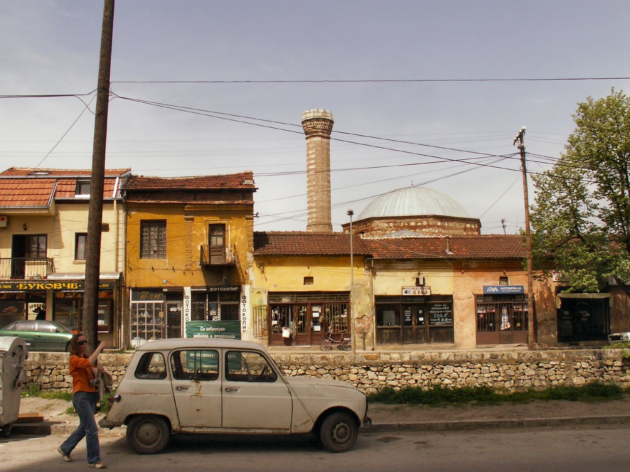 Bitola 12